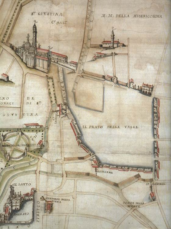 Particolare dell'area di Prato della Valle estratto dalla mappa del settore sud-est della città. L'autore originale fu Francesco Bacin nel 1767. L'estratto è tratto da una copia dell'originale eseguita dal pubblico perito Stefano Codroipo sempre nel 1767